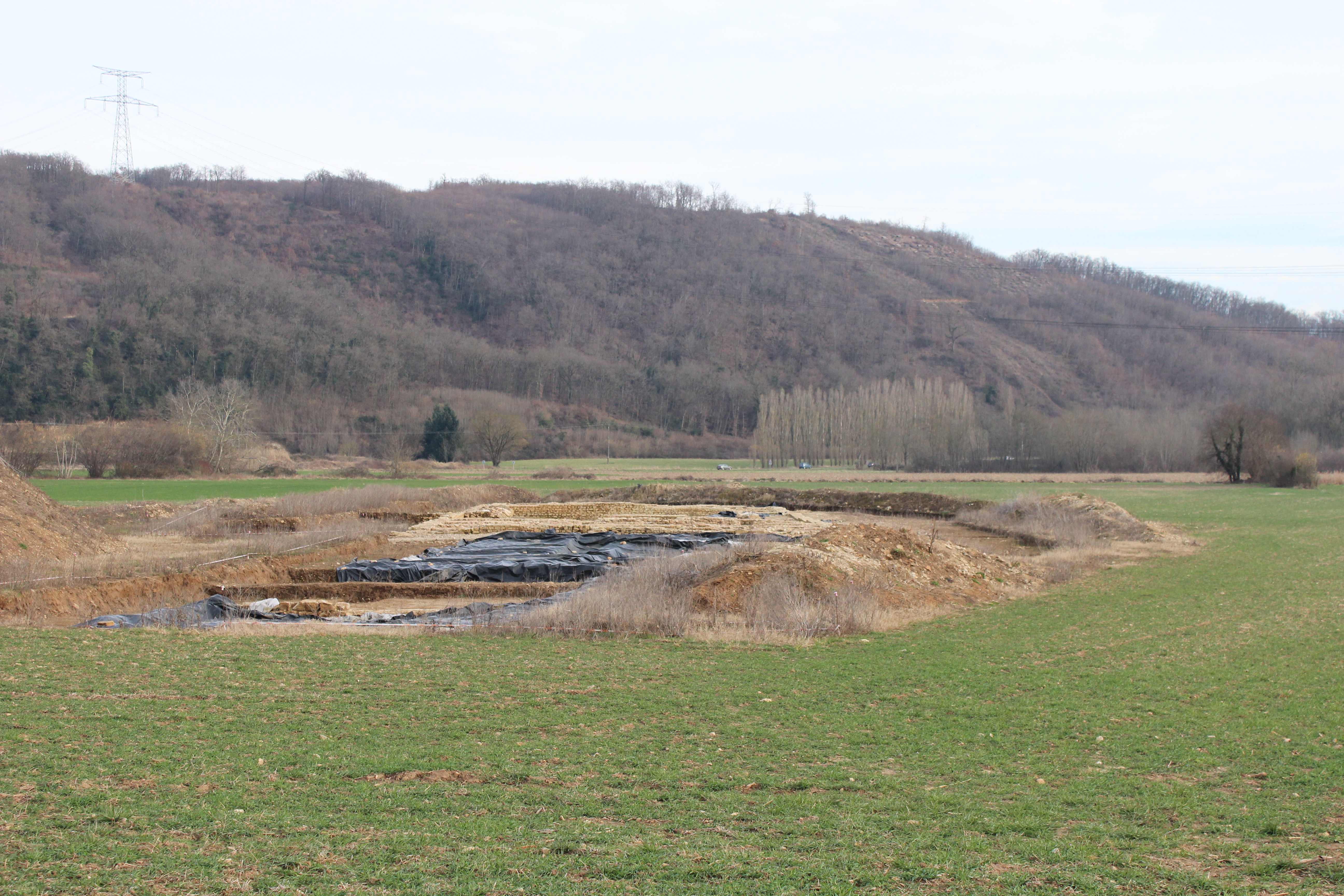 Panossas - Site de fouille des Buissières.